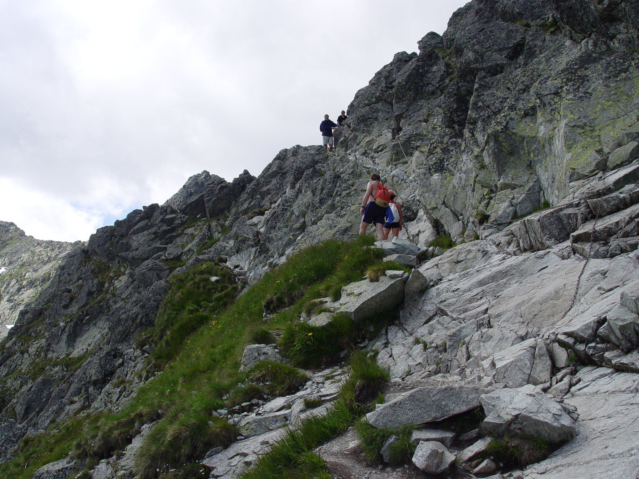 Magas-Tátra,_Lengyel-nyeregről_lefelé_